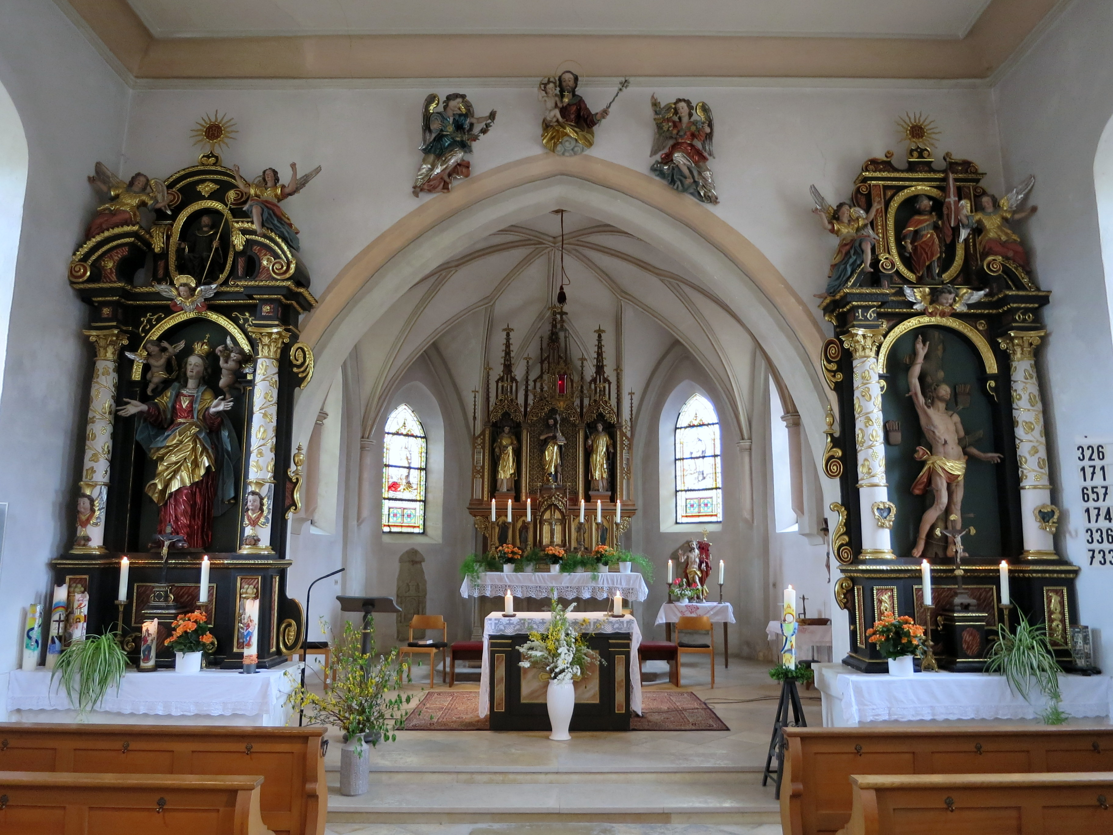 Eine schön ausgestattete Filialkirche St. Laurentius im Ortsteil Viehbach von Fahrenzhausen